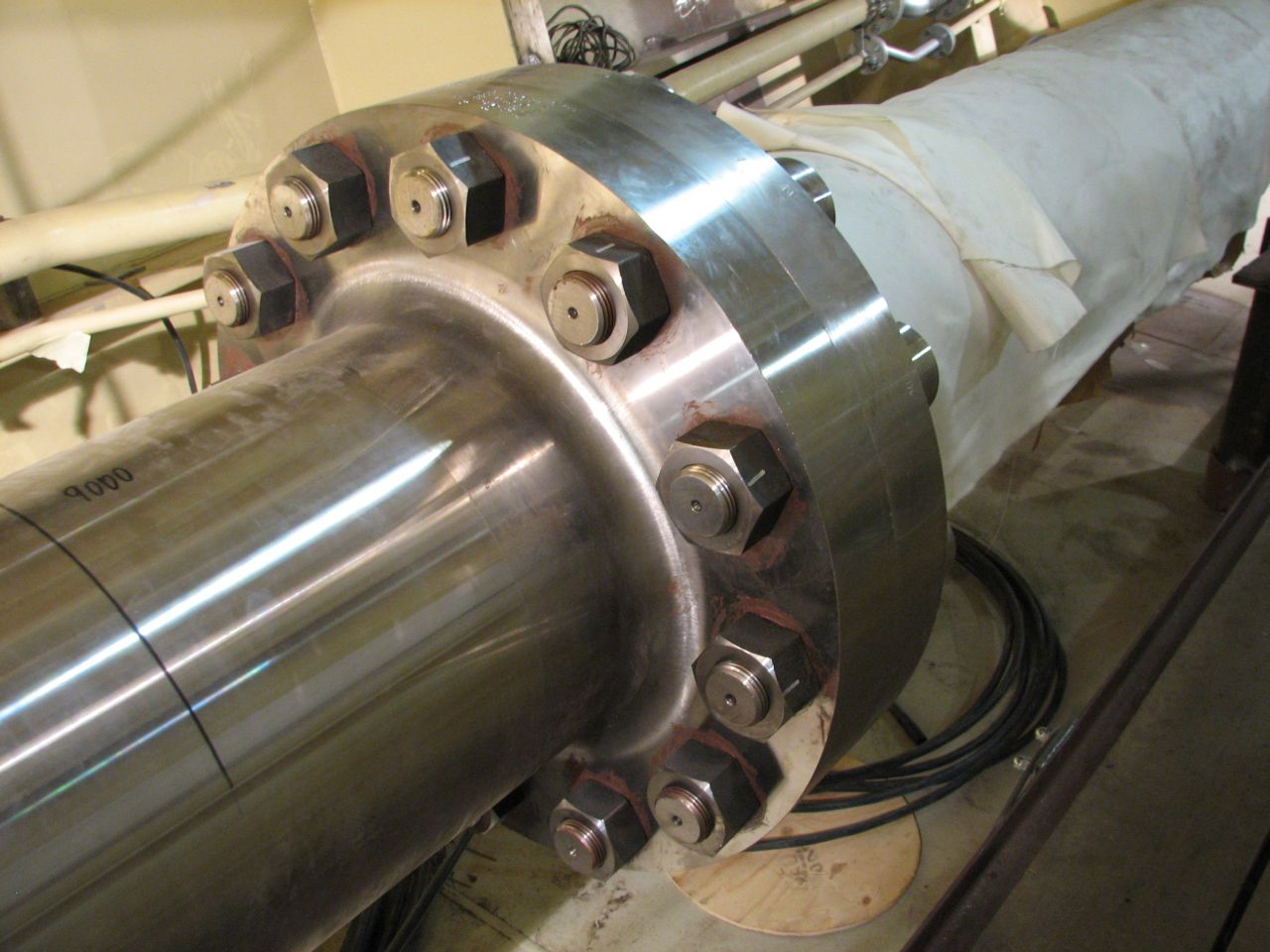 Flensburger Schiffbau Gesellschaft